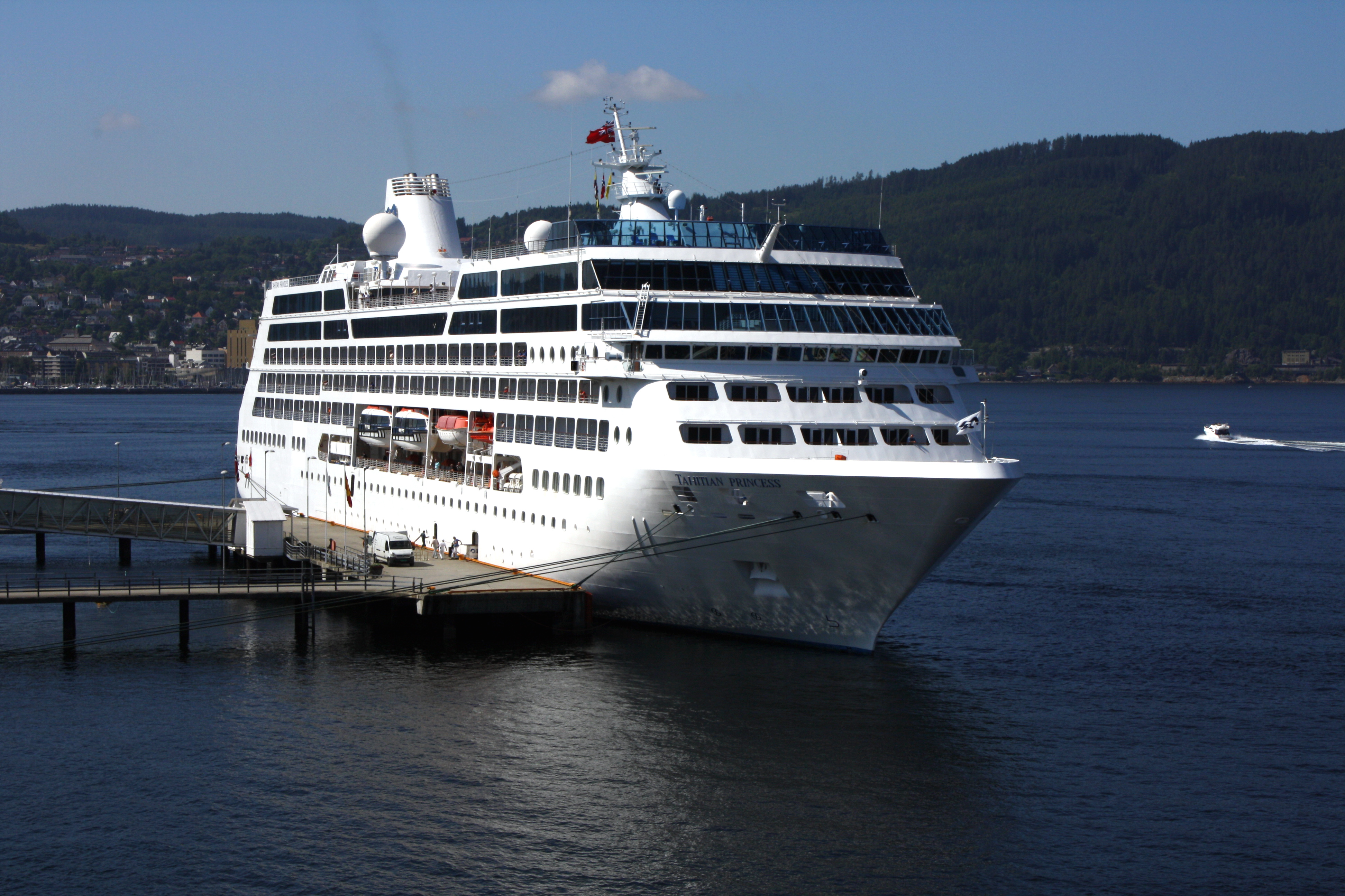 Cruiseskipet Tahitian Princess besøkte Trondheim havn for første gang 3. juli 2009.